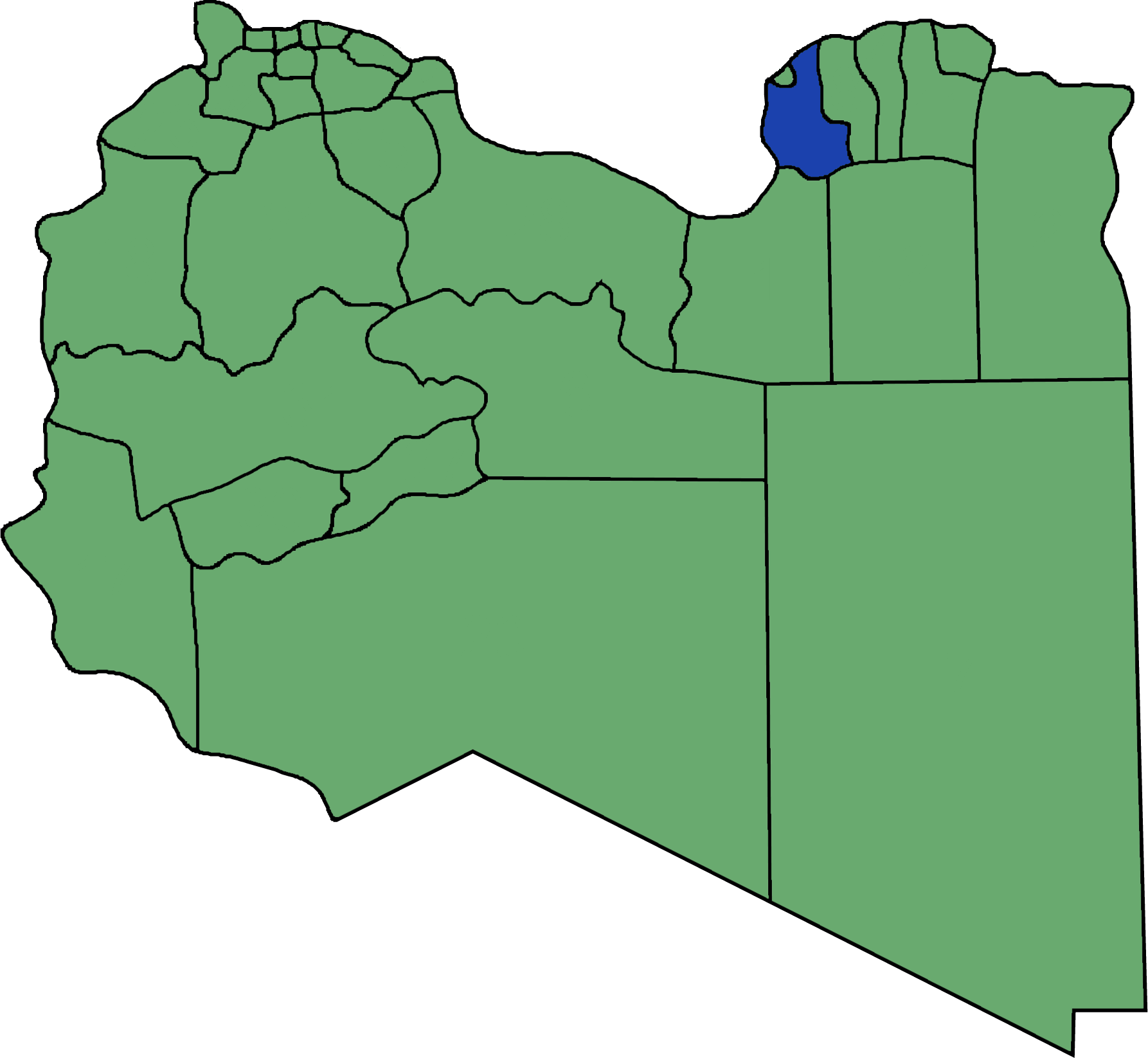 Die neuen Gemeinden (Munizipien) in Libyen. Al Hizam Al Akhdar hervorgehoben.